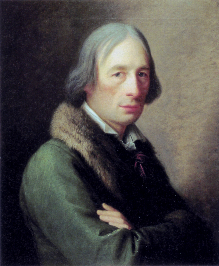 Karl Müller-Friedberg (1755–1863), Schweizer Politiker und erster Landamman des Kantons St. Gallen